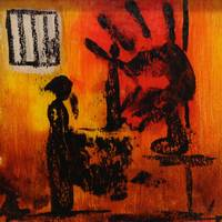 peinture